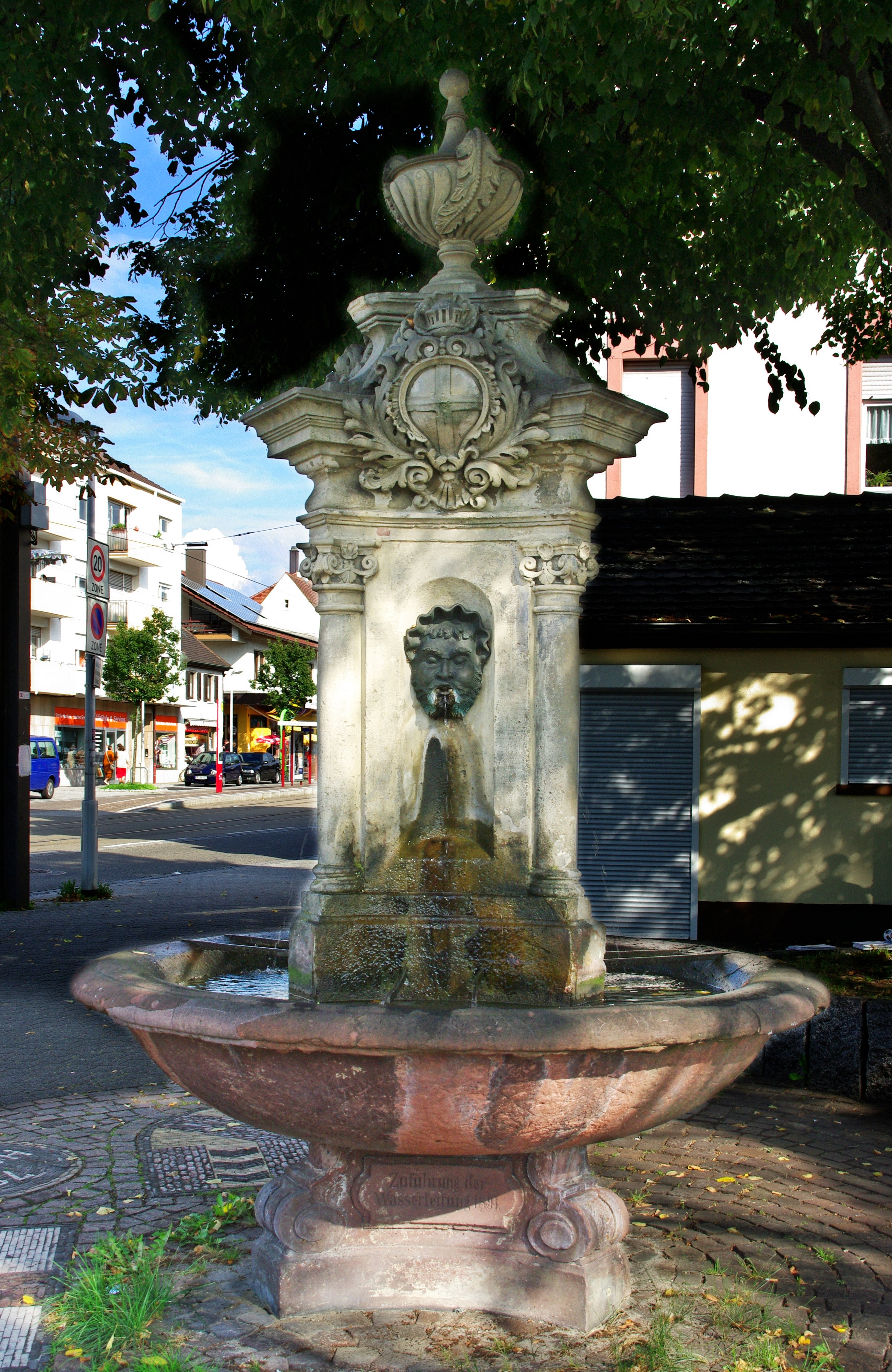 Der Brunnen von Julius Seitz an der Ecke Carl Kistner Straße, Uffhauser Straße